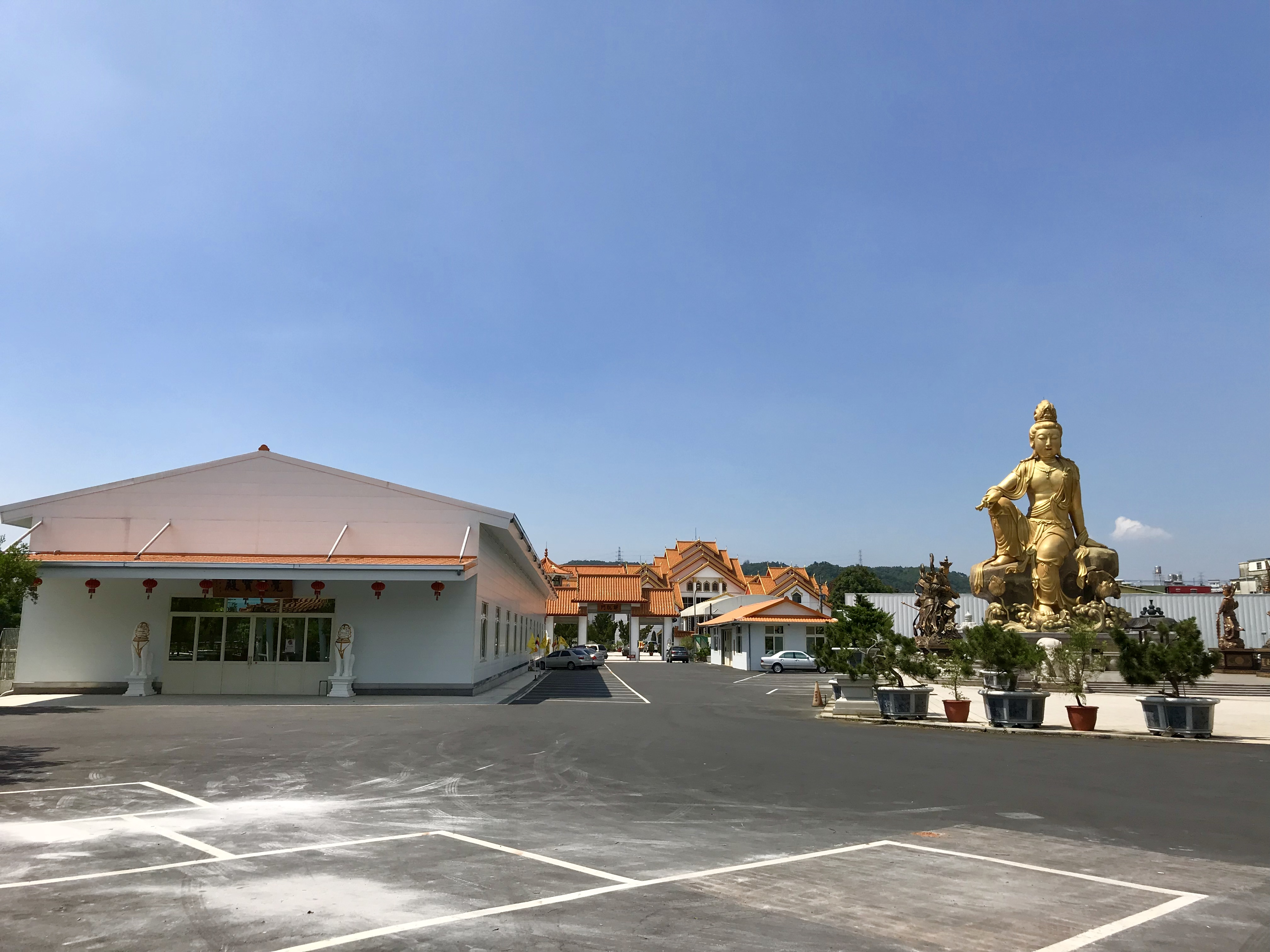 中文（台灣）: 潮音禪寺遠景